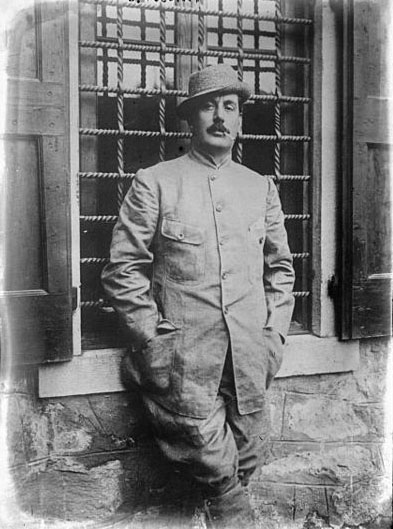 Puccini in jacket, smoking cigarette davanti la sua casa all'Abetone